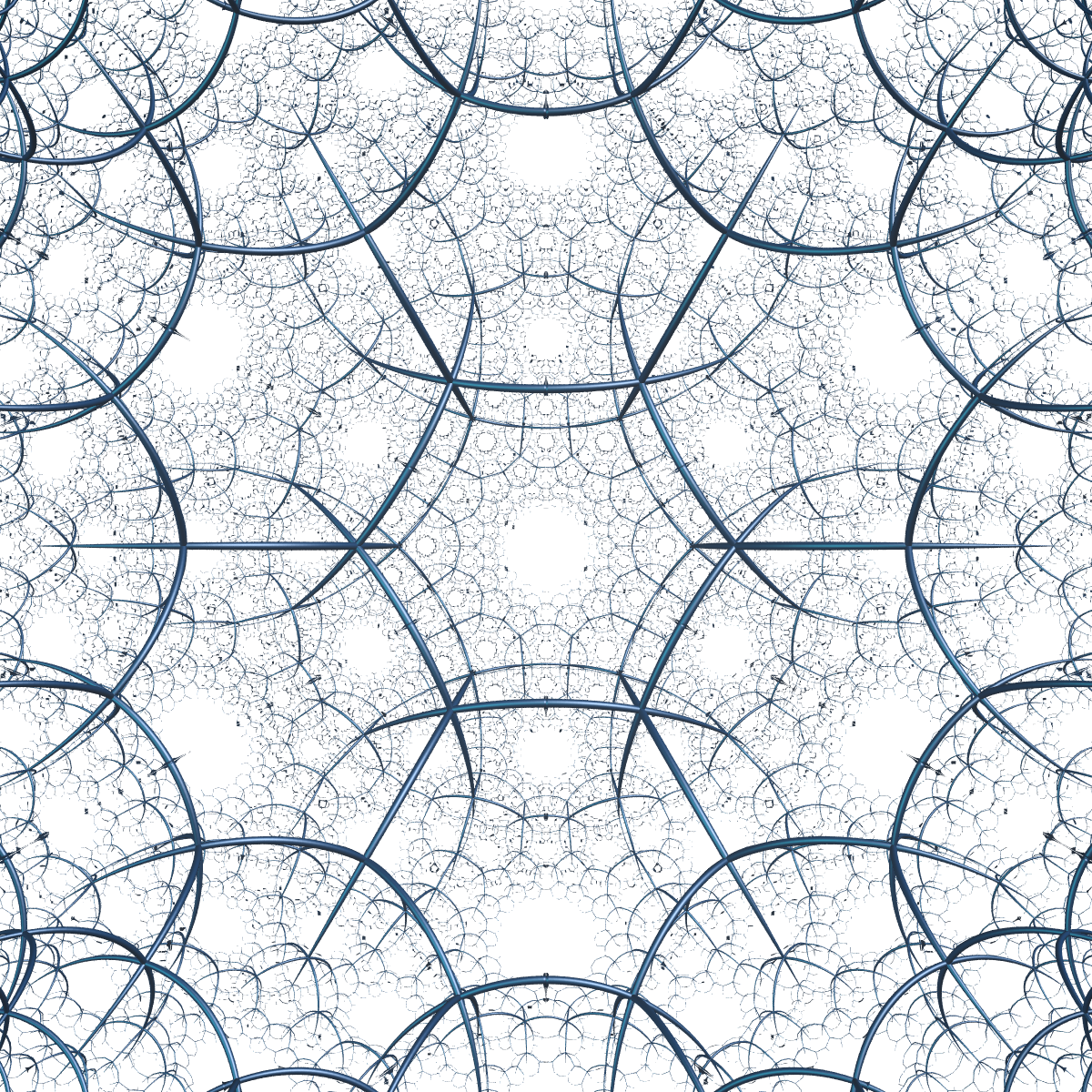 order 4 hexagonal tiling on Hyperbolic 3d space